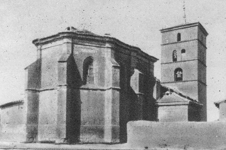 Iglesia parroquial. Ábside - Mazariegos (Palencia) - España Turística y Monumental / Cuarto álbum / Las Bellezas de Castilla / Región Leonesa - Cromo 70 x 50 Sepia